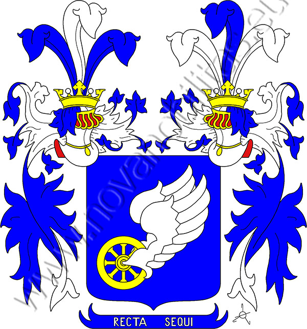 Erb rytířů von Schönerer